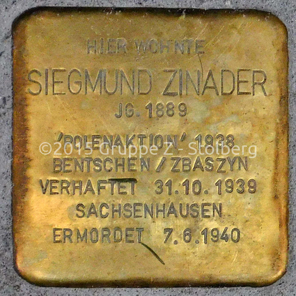 Stolperstein für Siegmund Zinader verlegt am 18. Dezember 2015